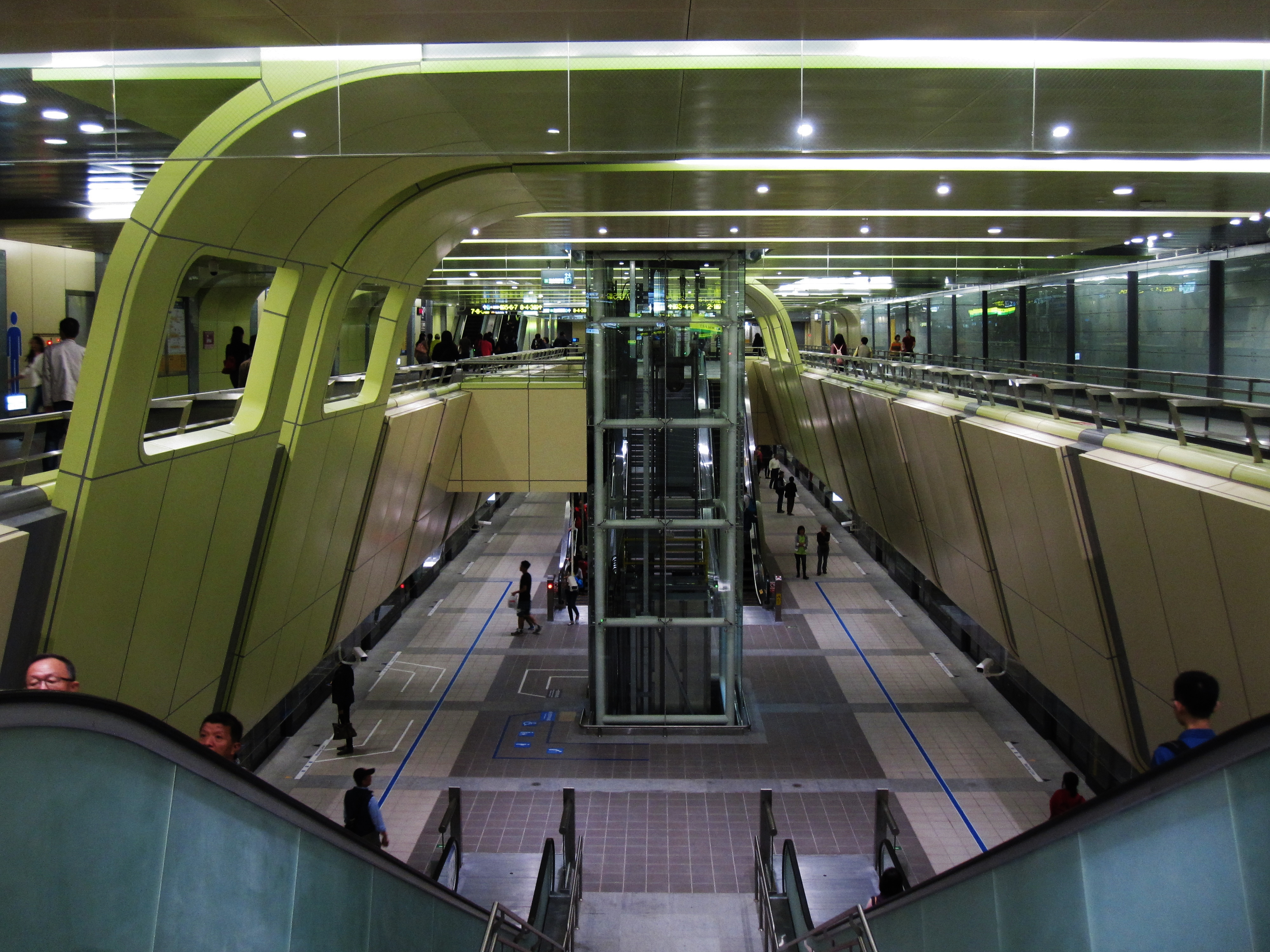 中文（台灣）: 捷運松山線南京復興站穿堂層